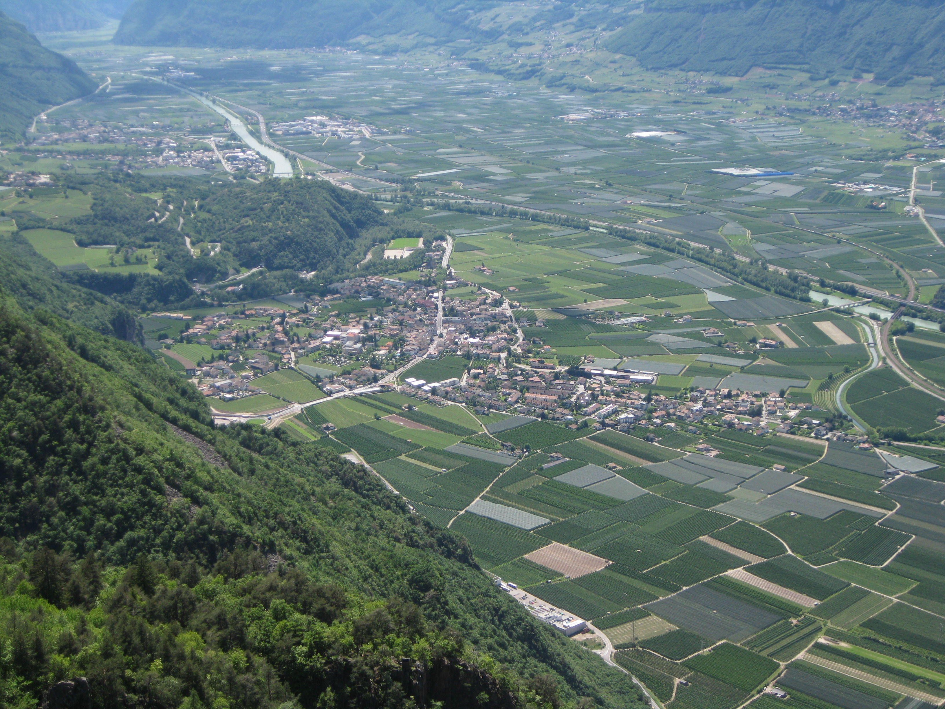 Die Dörfer Auer und Neumarkt in Südtirol von Norden (Rotwand) aus betrachtet, dazwischen der Hügel von Castelfeder